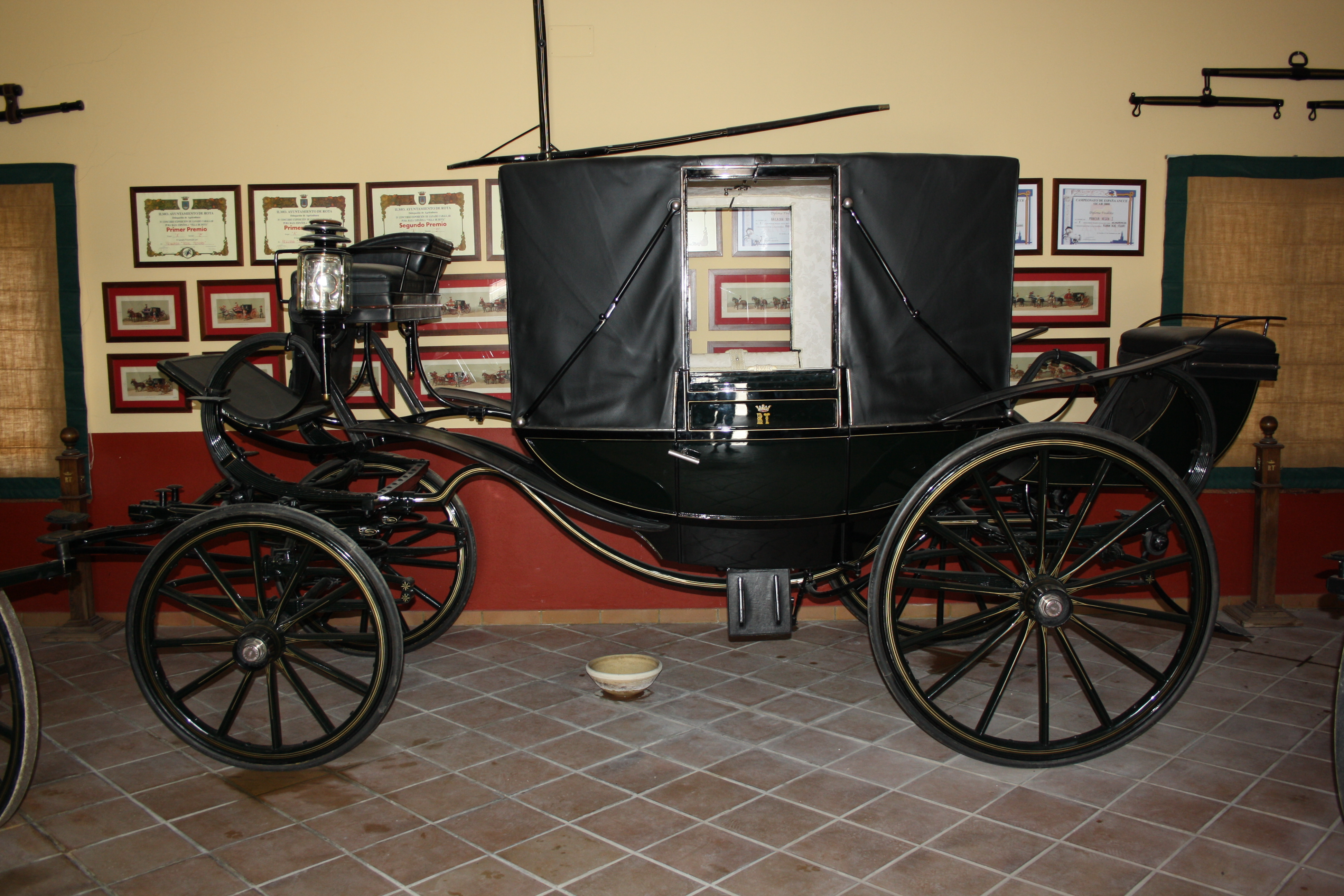 Landau carriageJerez, Andalusia, Spain